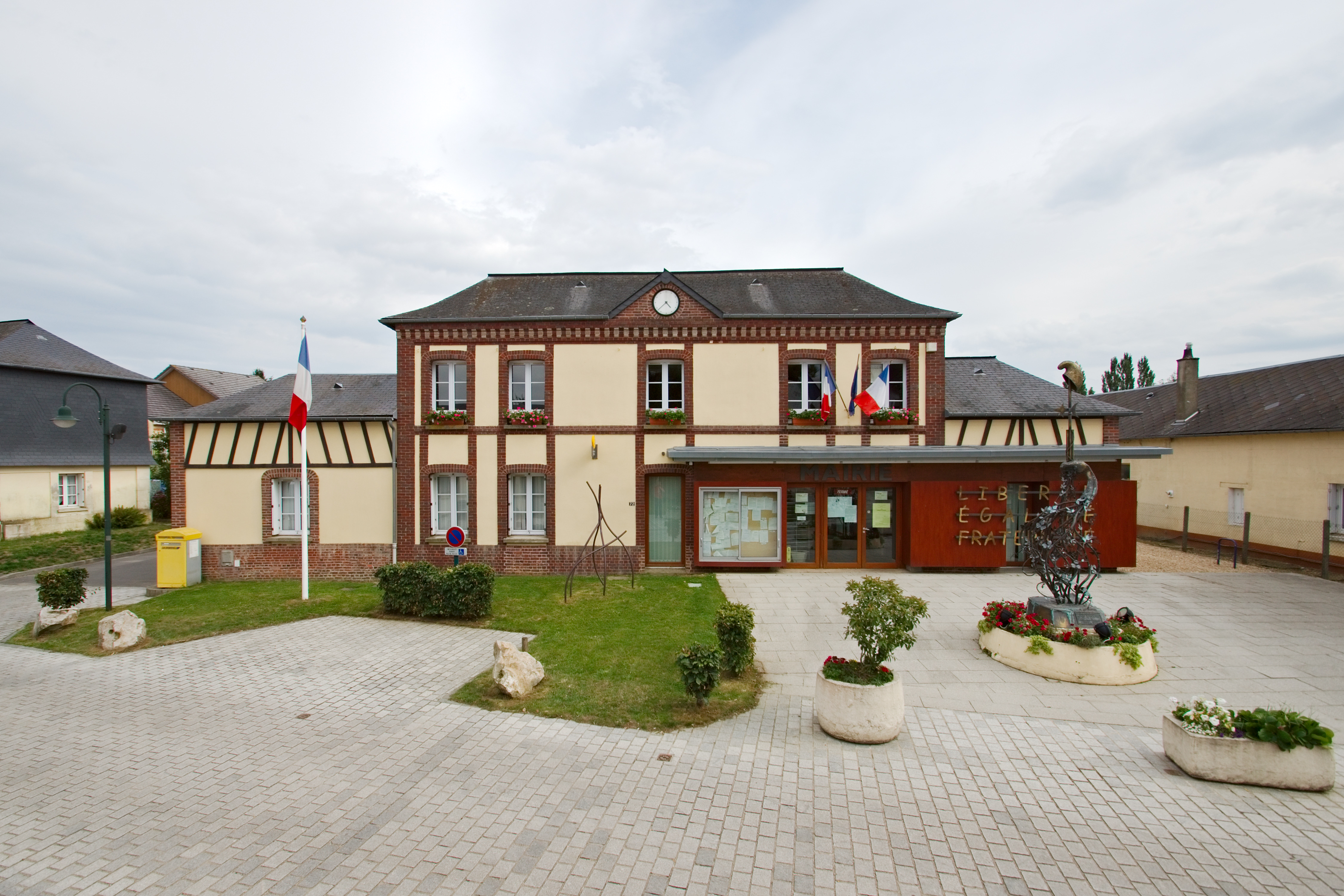 Mairie de Roncherolles-sur-le-Vivier, rue de l’Église